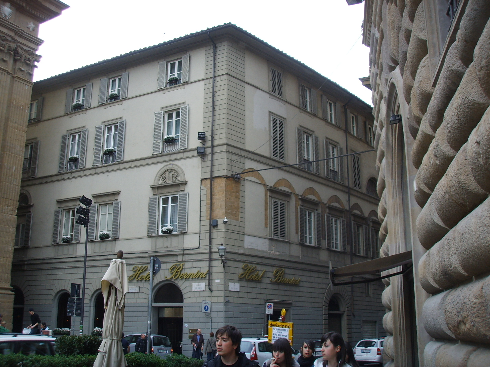 Palazo columbia parlamento